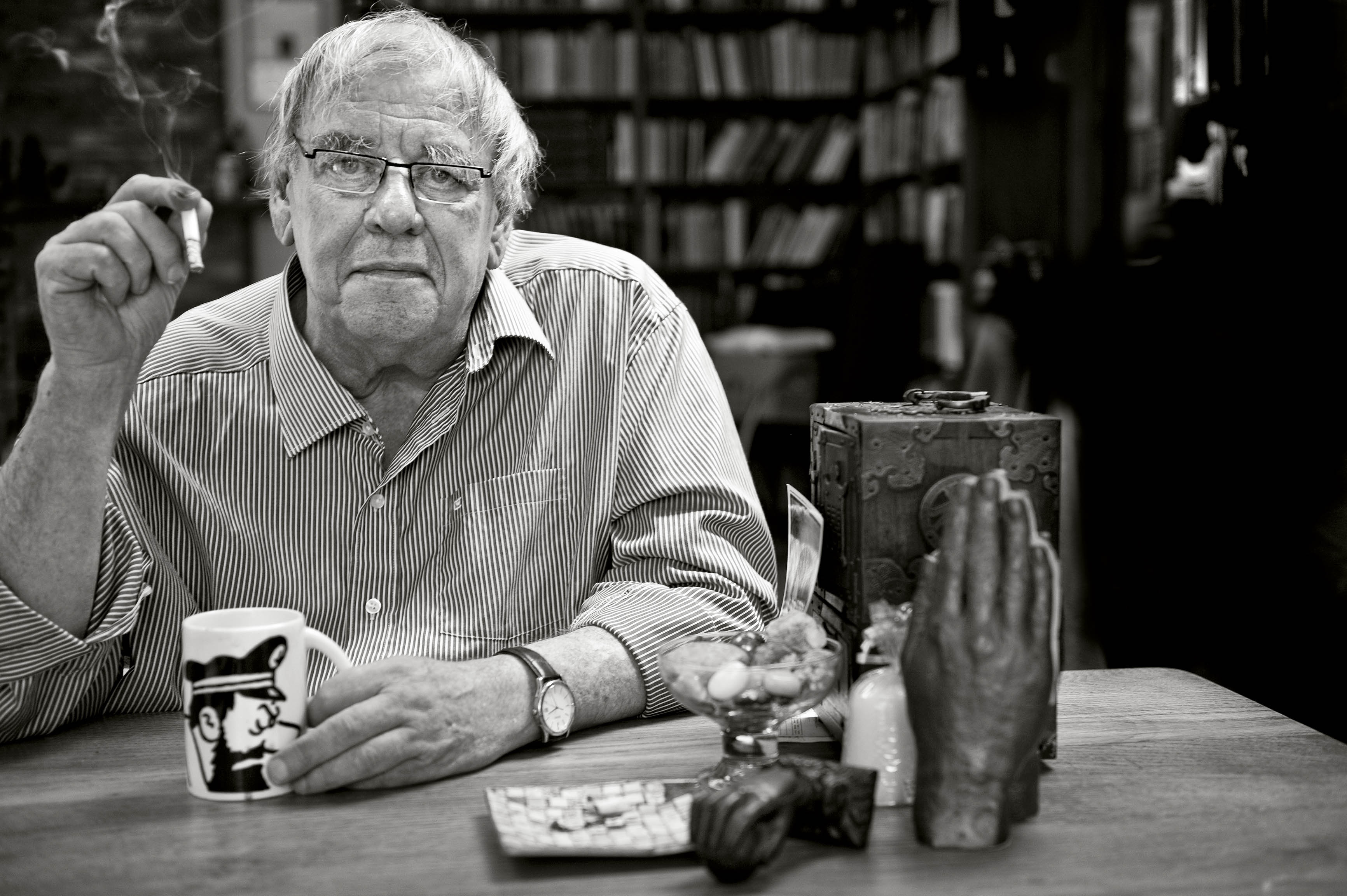 De schrijver Jeroen Brouwers.